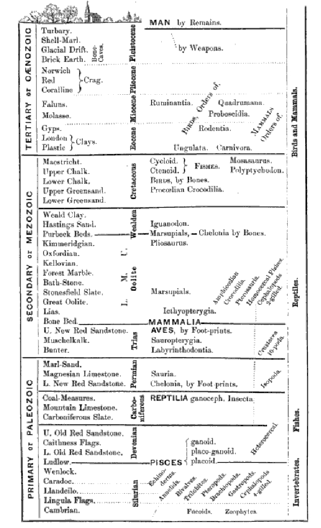 Diagram of geologic timescale circa 1861